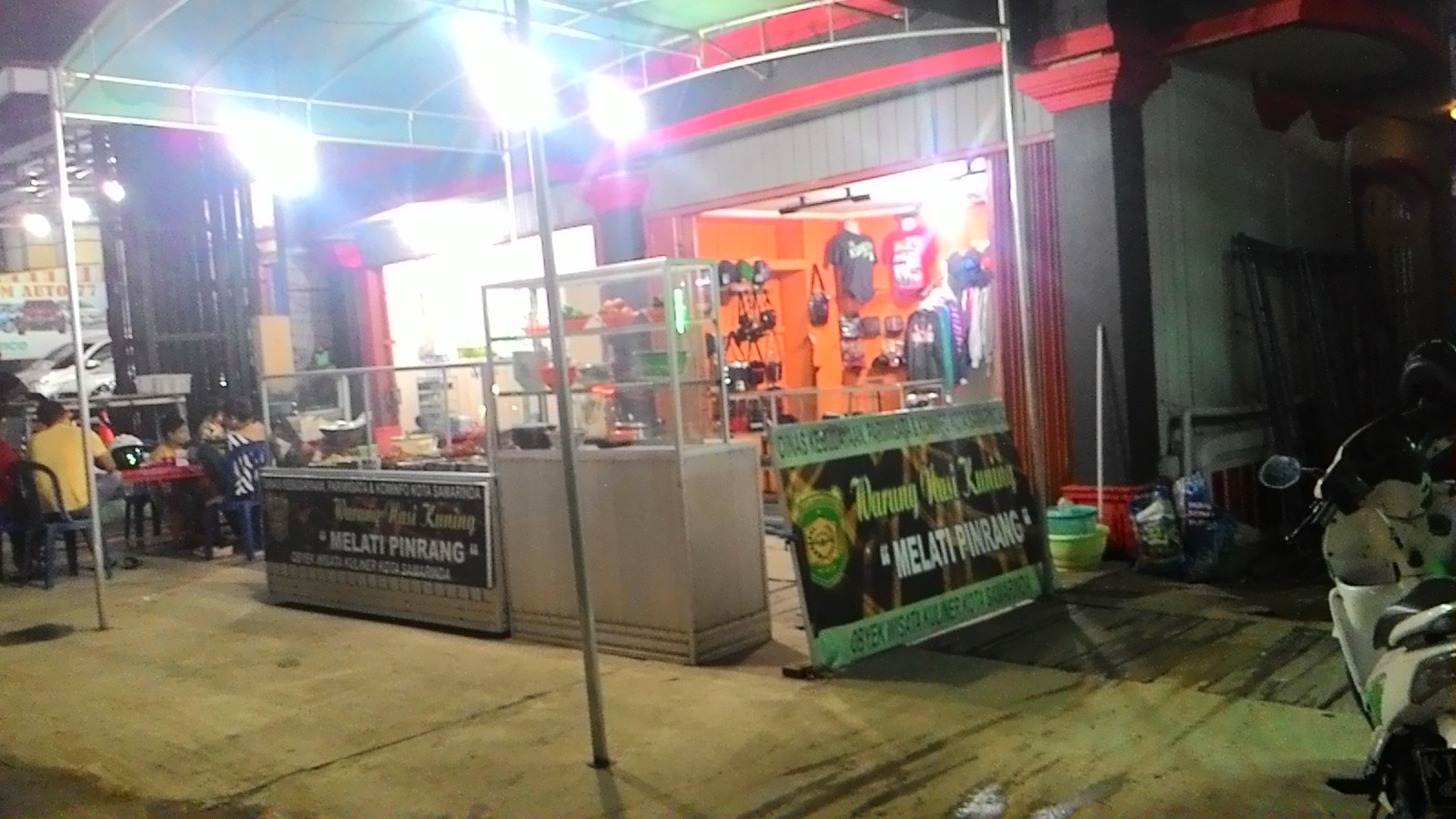 warung nasi kuning melati pinrang